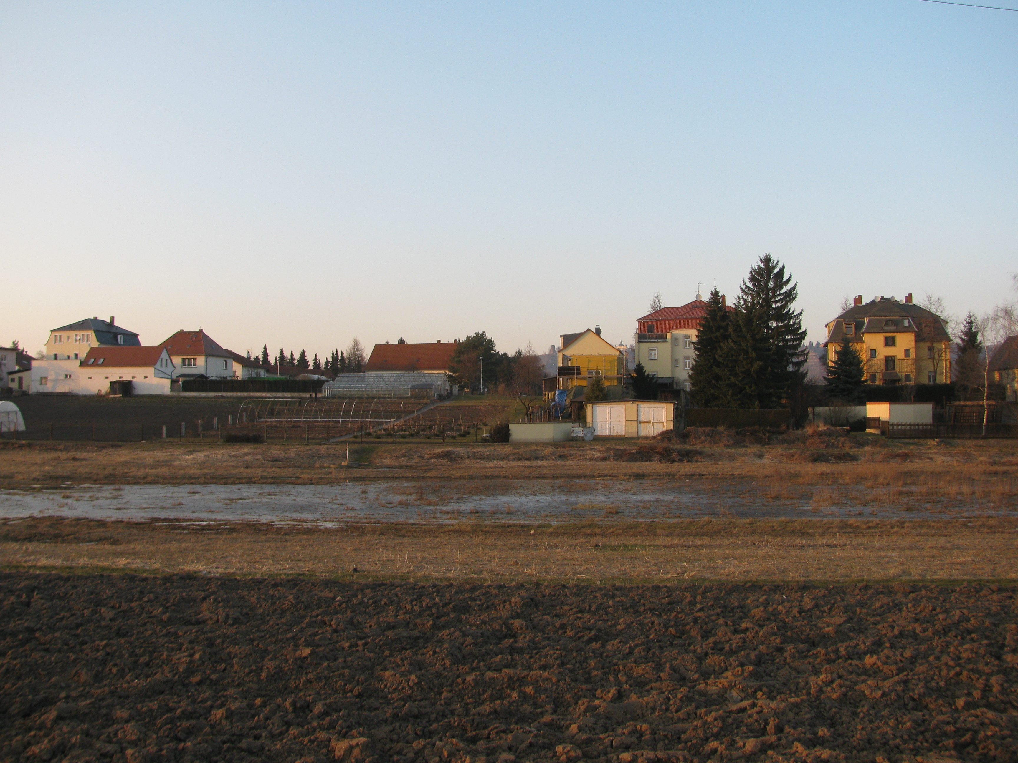 Staunasse Flächen in den Seewiesen Radebeul, im Hintergrund die Lößnitzhöhen mit Spitzhaus und Bismarckturm